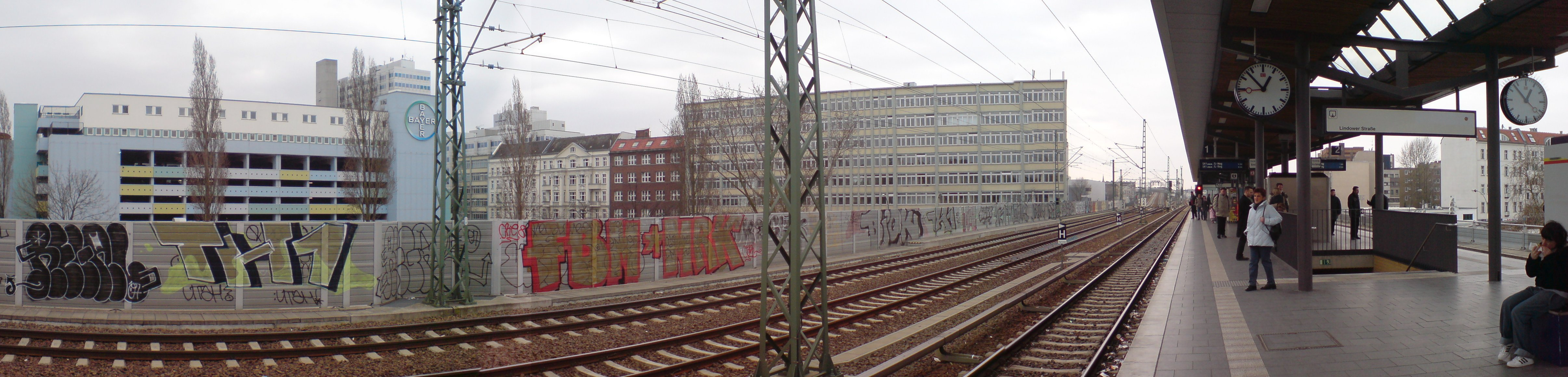 S-Bahnhof Wedding mit Blick nach Südwesten auf Gebäude von Bayer Schering Pharma (vormals Schering). Panorama mit Hugin und GIMP erstellt.